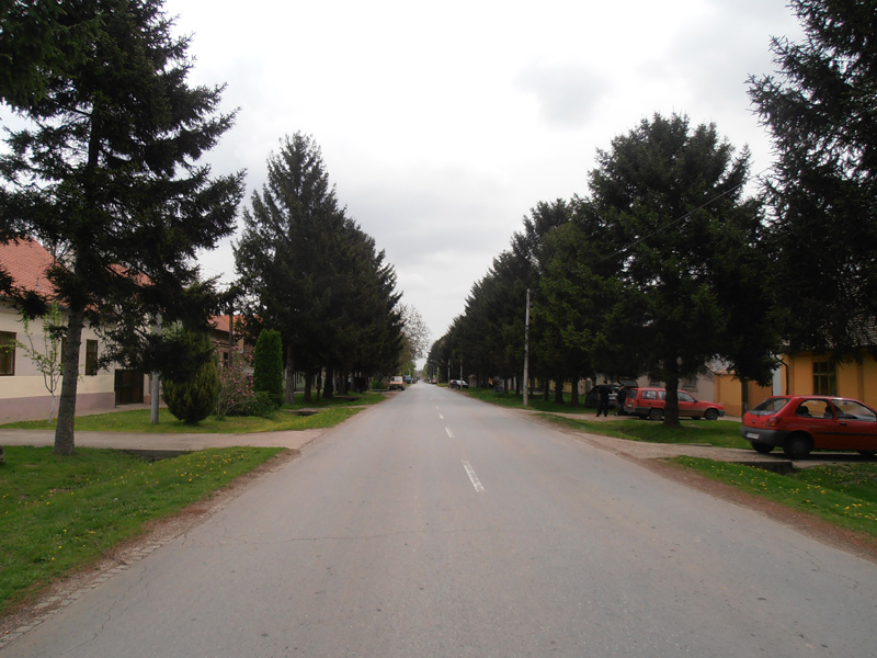 Erdevik Lenjinova ulica, April,2012.